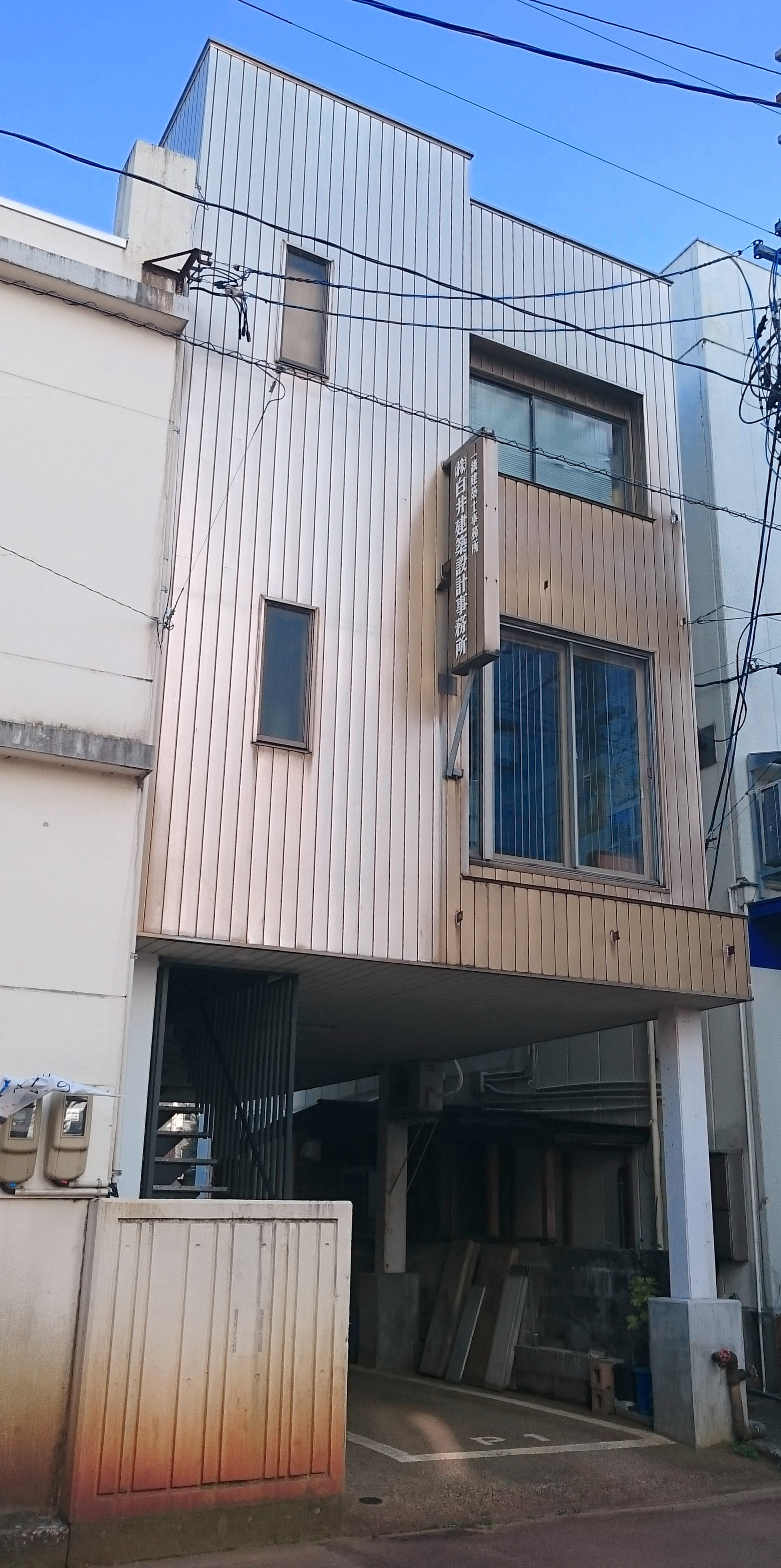 白井建築事務所の本社外観